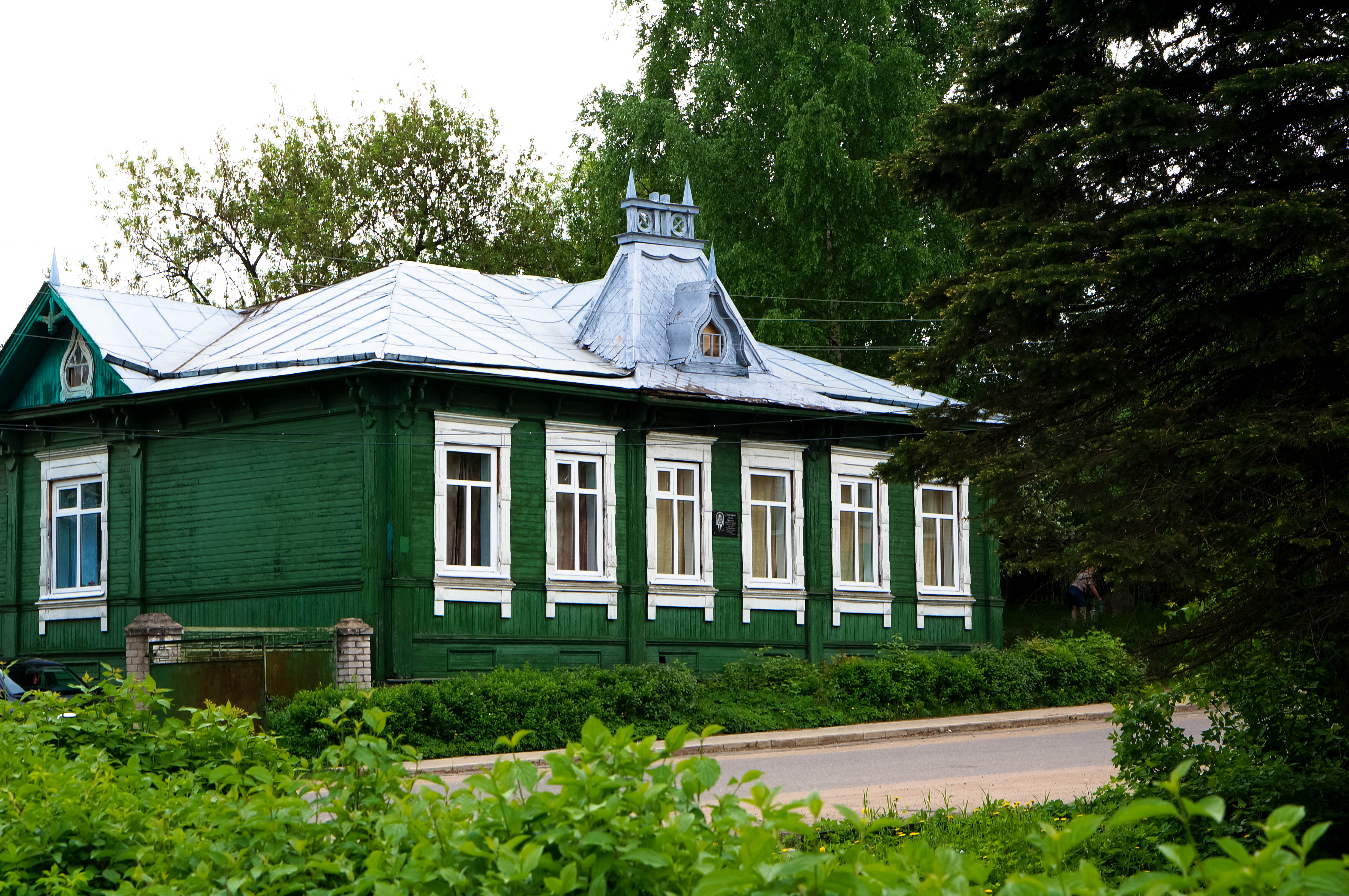 Краеведческий музей им. Антона Ефимовича Смусенка